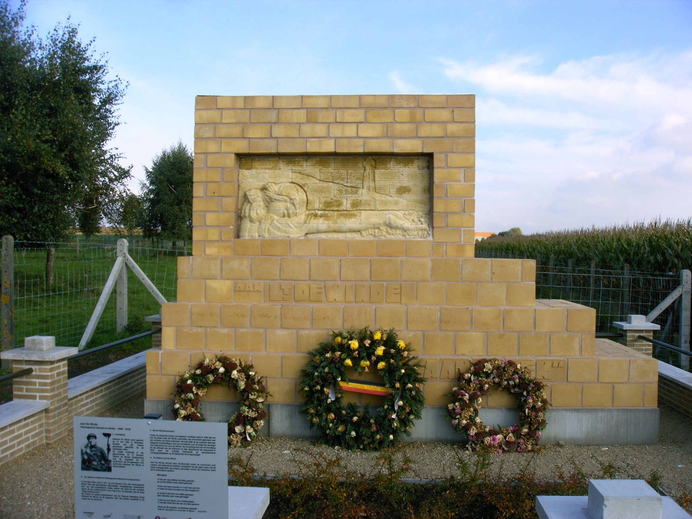 Dit is het monument van Juul De Winde dat nu in de Hyndrickxbosstraat te Weststrozebe staat